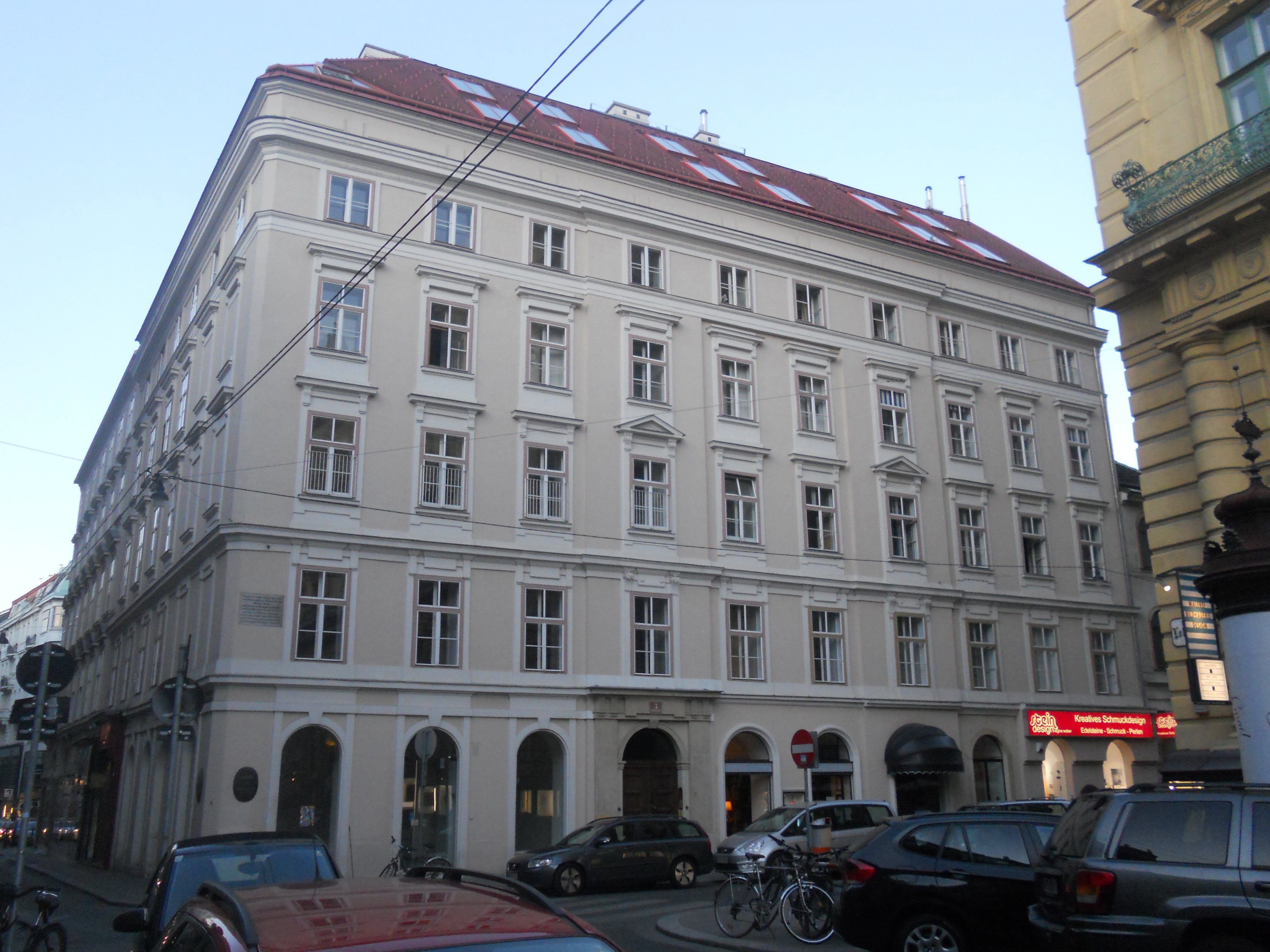 Haus Lobkowitzplatz 3 in Wien